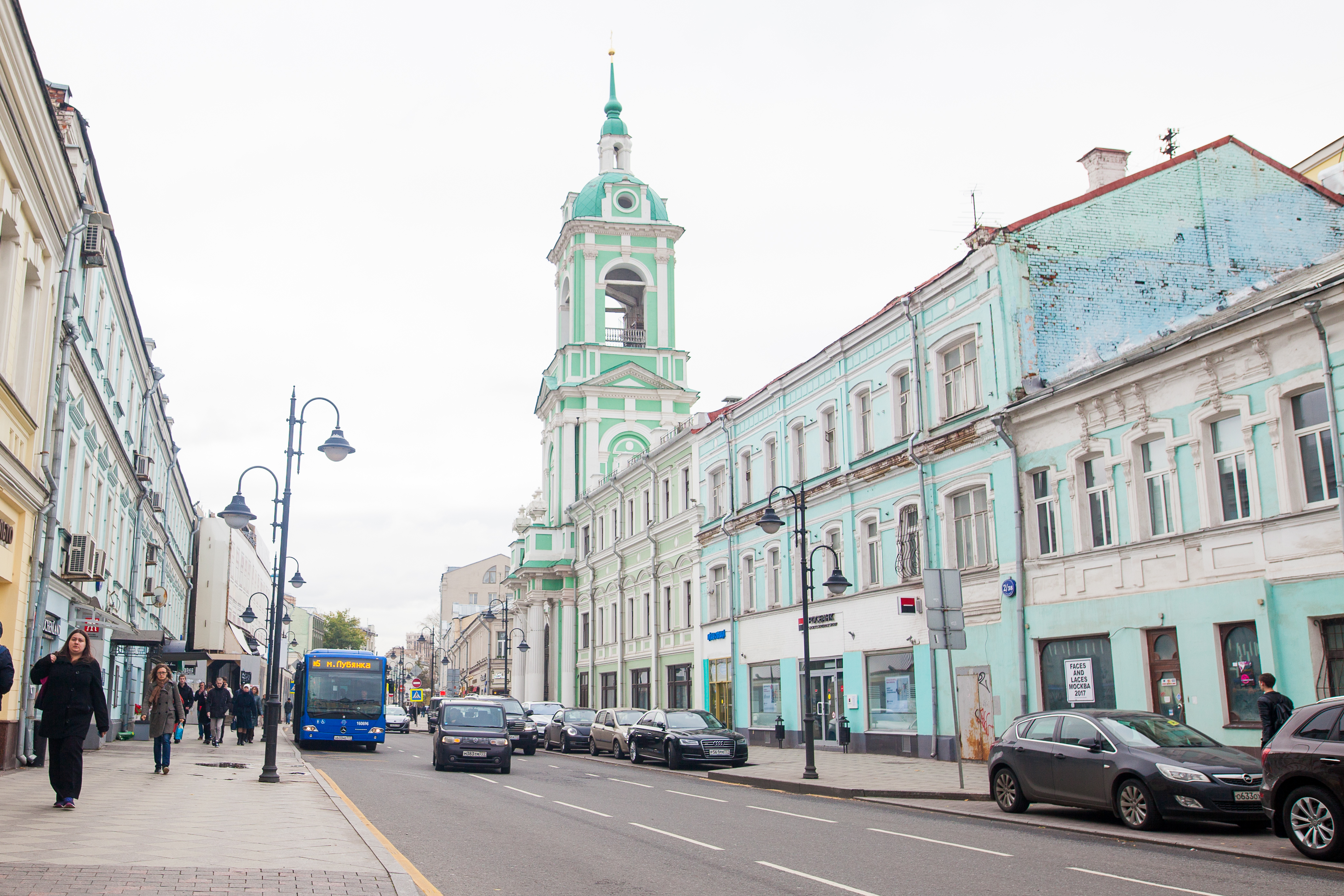 Вид с Пятницкой улицы